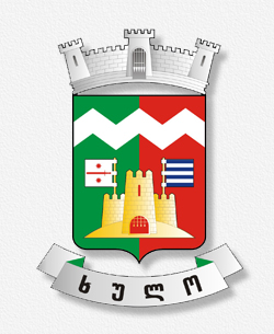 ხულოს მუნიციპალიტეტის გერბი